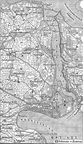 Situationskarte der Befestigungen von Düppel (1864)